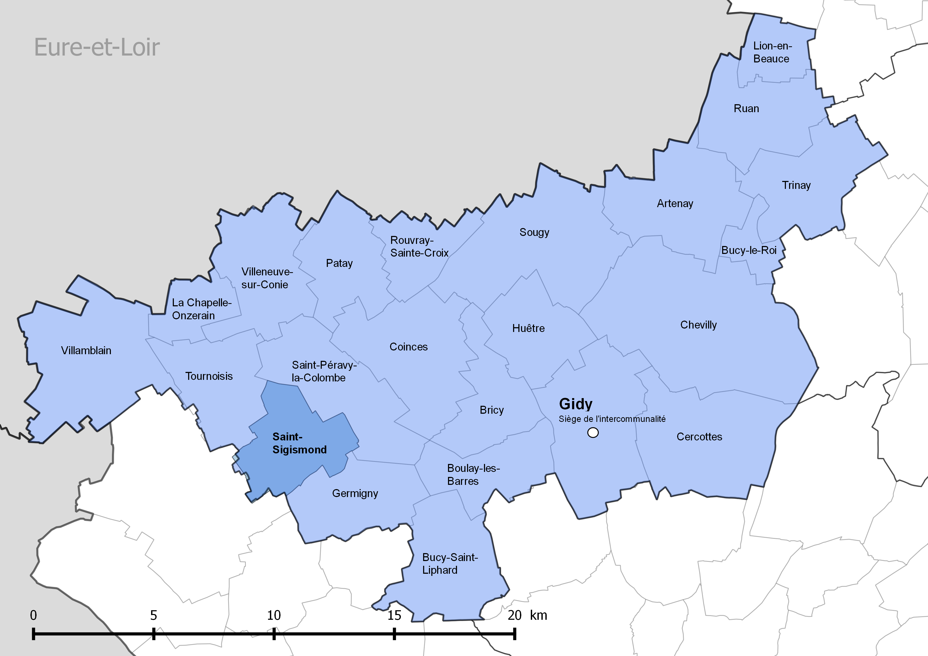 Périmètre de la communauté de communes de la Beauce loirétaine - Situation de la commune de Saint-Sigismond